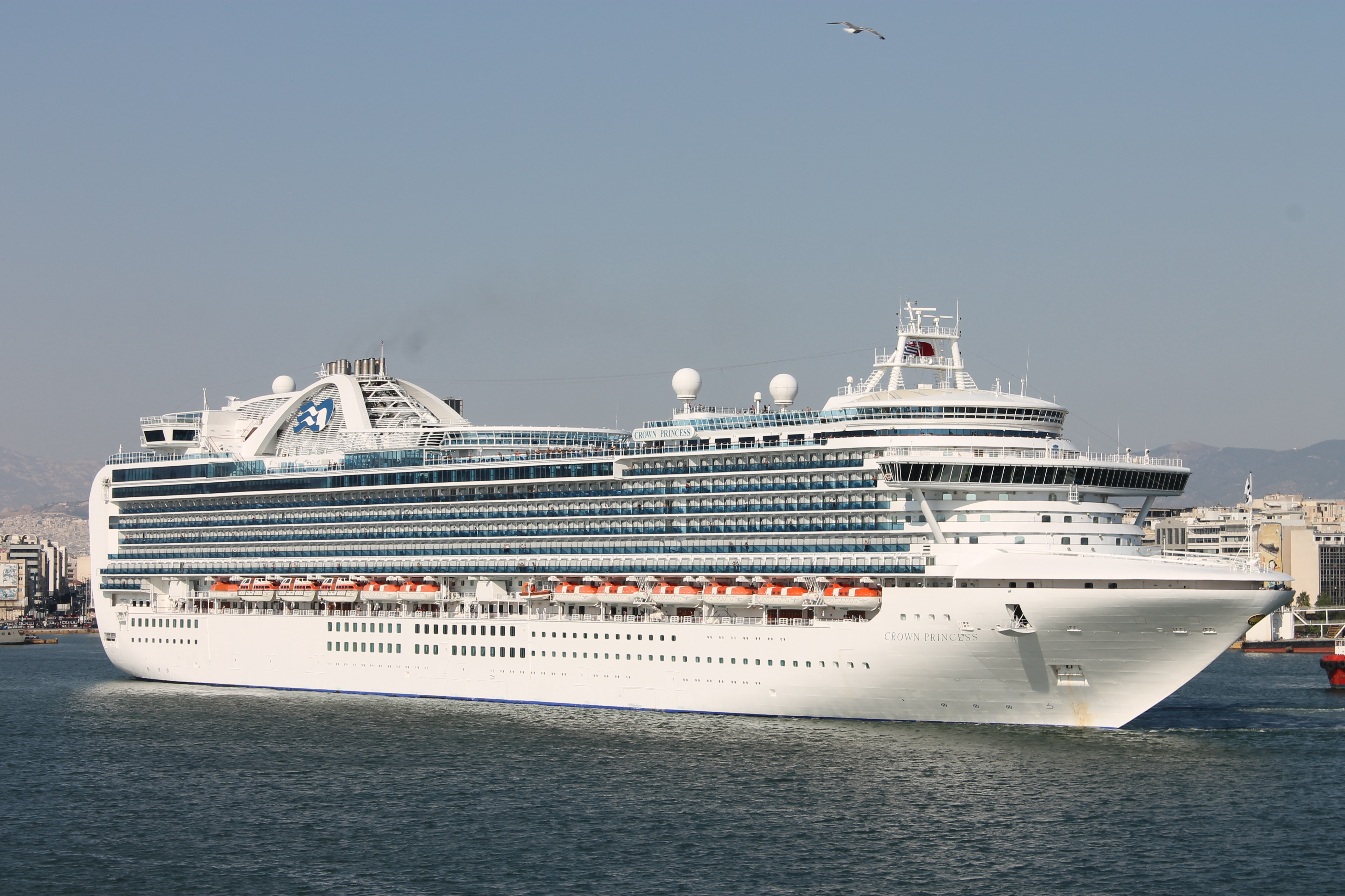 Kreuzfahrtschiffe